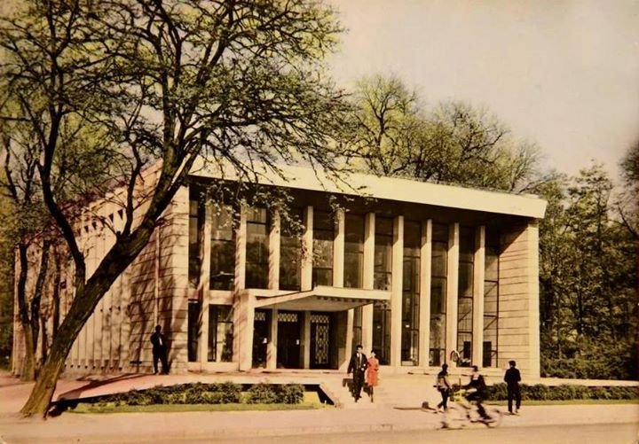 Сградата на Дом на младоженците през 1968г.